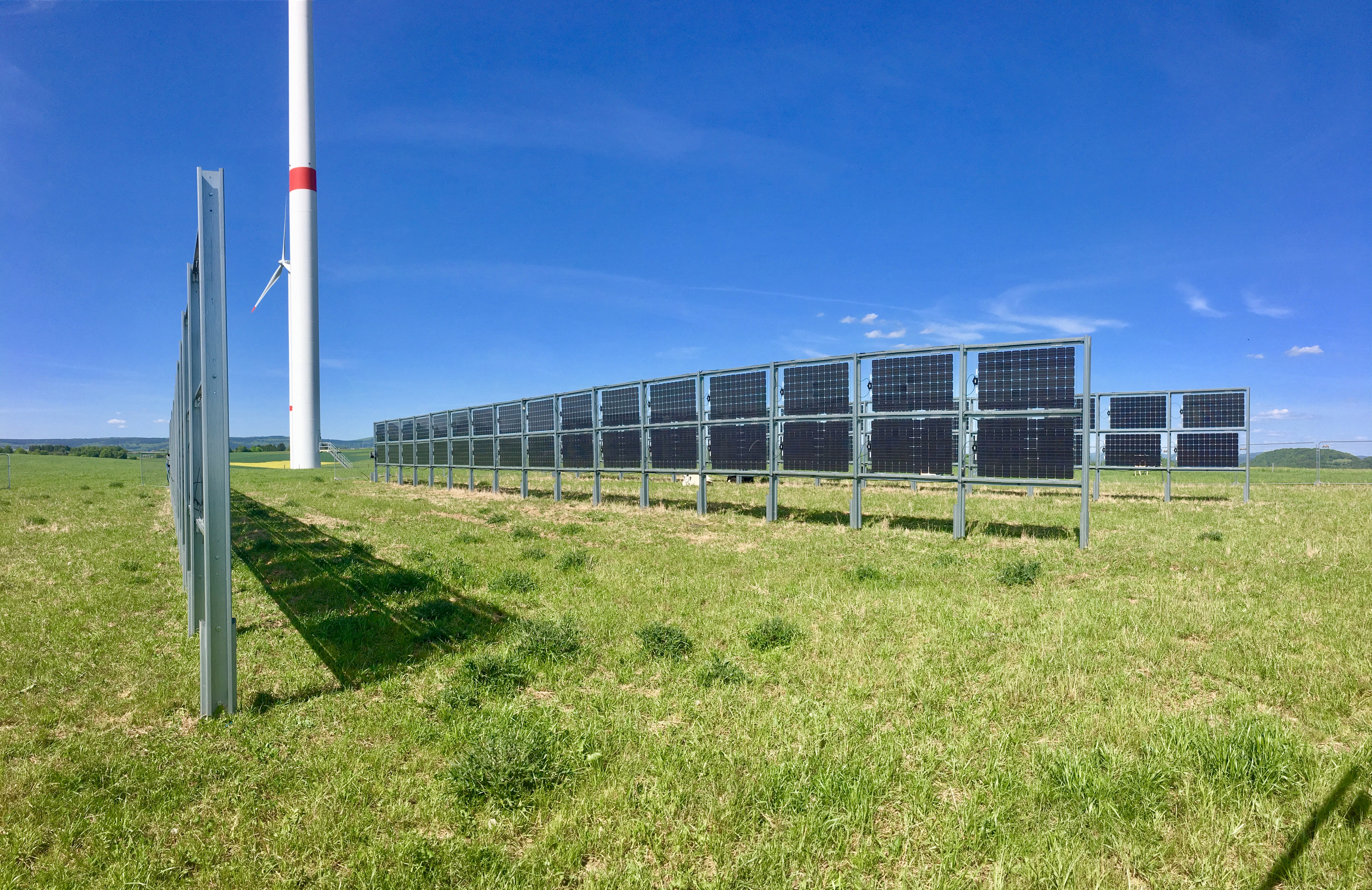 Bifaziale PV-Pilotanlage (30 kWp, Next2Sun-Anlagenkonzept) in Losheim am See (Saarland), errichtet im Mai 2015 auf einer Weidefläche. – Das Gestellsystem ist speziell für den Einsatz bifacialer Solarmodule konzipiert. Die Module sind beidseitig lichtempfindlich (bifacial). Bei senkrechten, Ost-West ausgerichteten Anlagen wird in den Morgen- und Abendstunden das Produktionsmaximum erreicht. Anders als bei konventionellen Südanlagen, die auf das direkte Sonnenlicht abzielen, ist bei senkrechten, bifacialen Modulen das diffuse und das reflektierte Licht von großer Bedeutung.